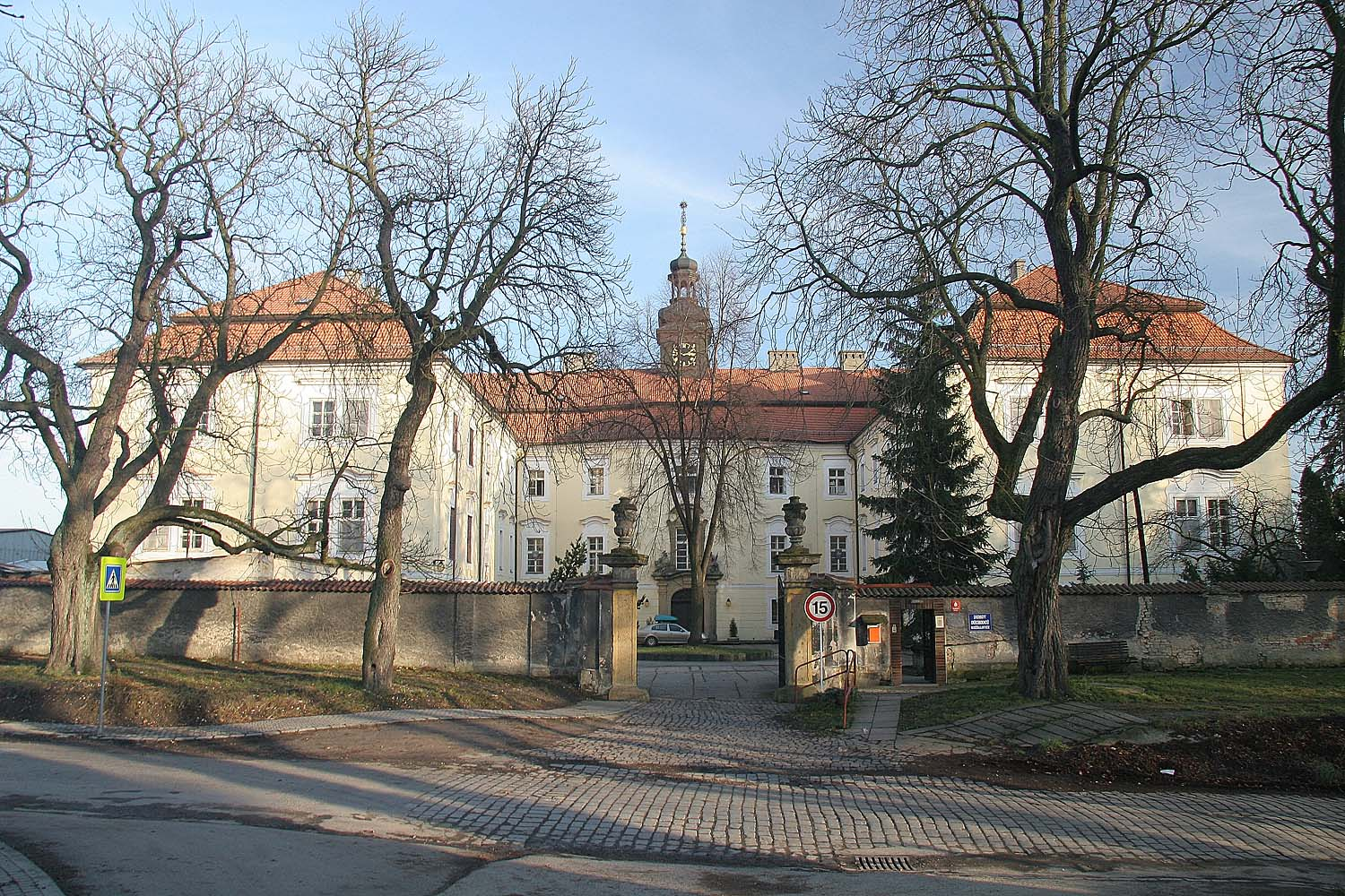 Zámek Rožďalovice. District Nymburk autor:Prazak date: 15. 1. 2007